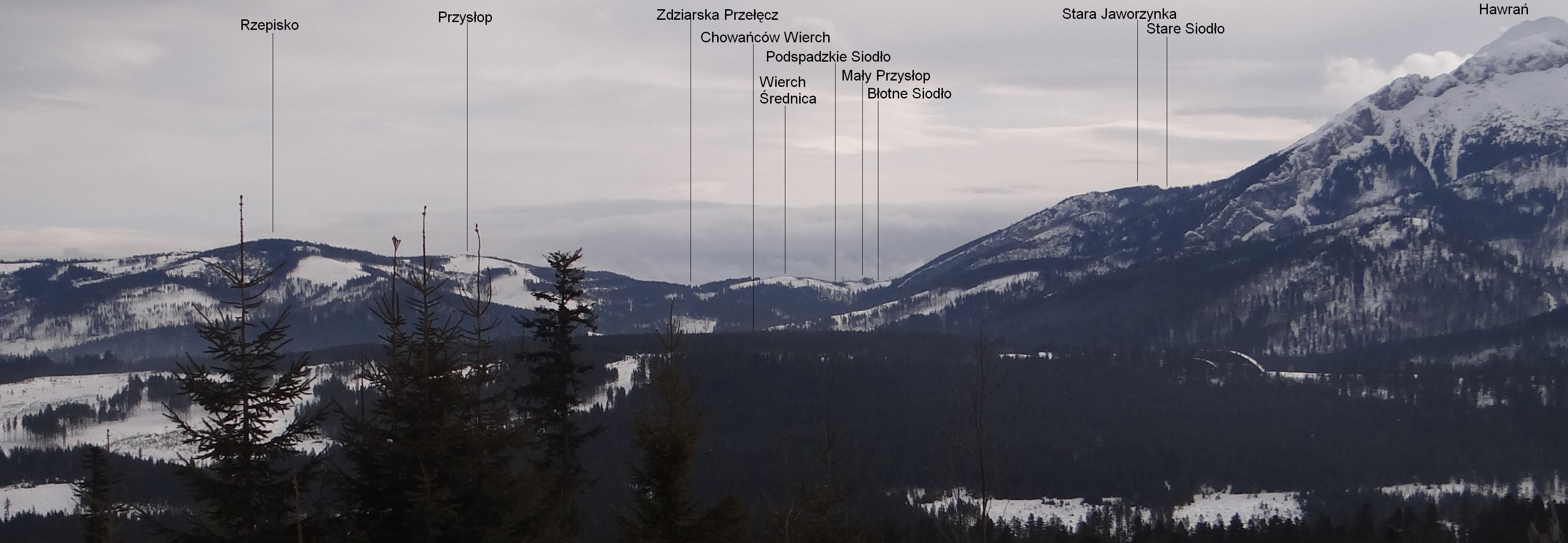 Widok od zachodniej strony